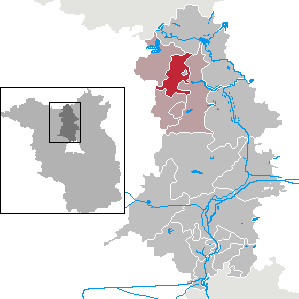 Großwoltersdorf in Brandenburg (Country) - District Oberhavel